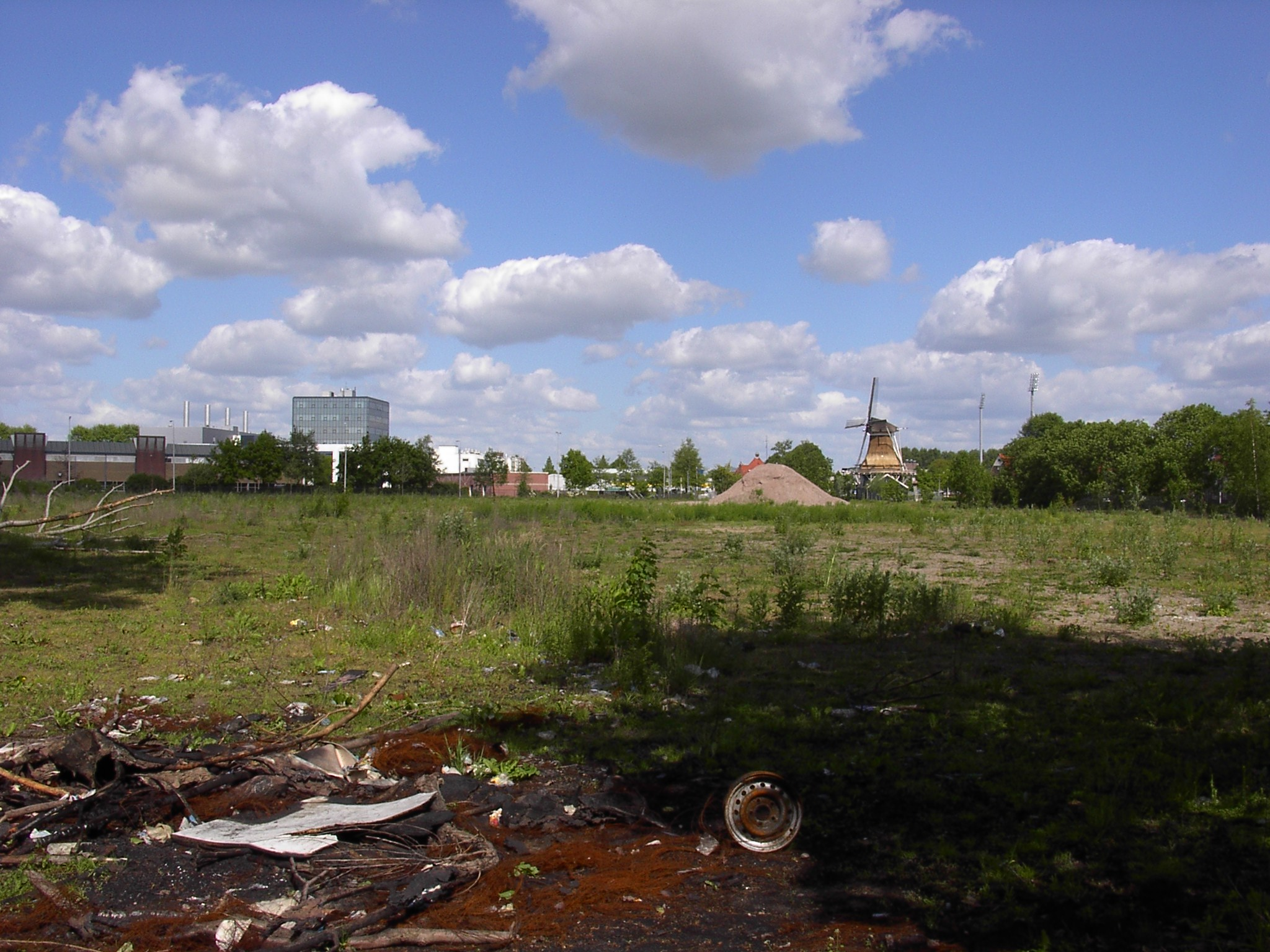 Voormalig terrein van Golden-Wonder in Zwolle